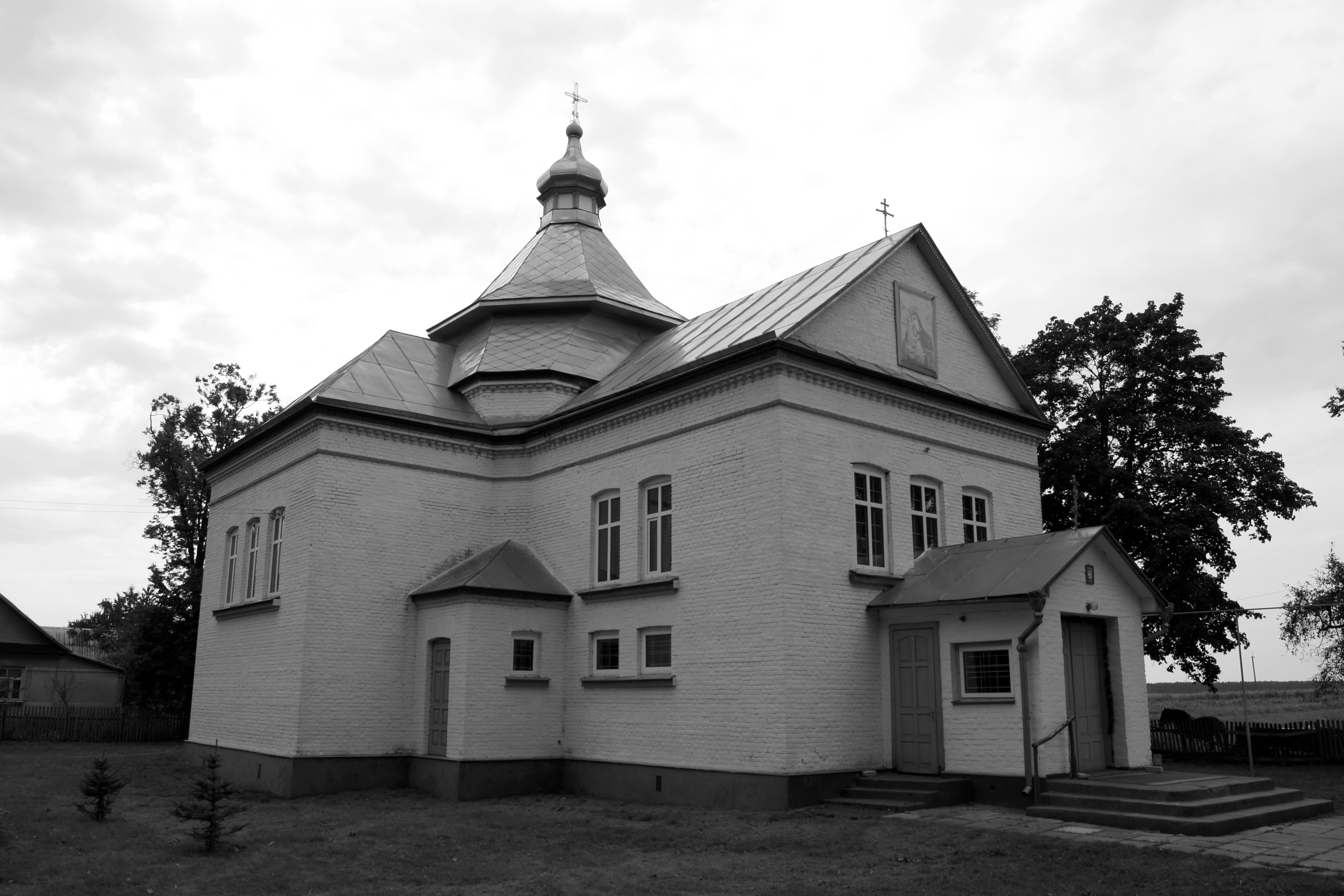 Успенська церква (мур.), с.Опарипси